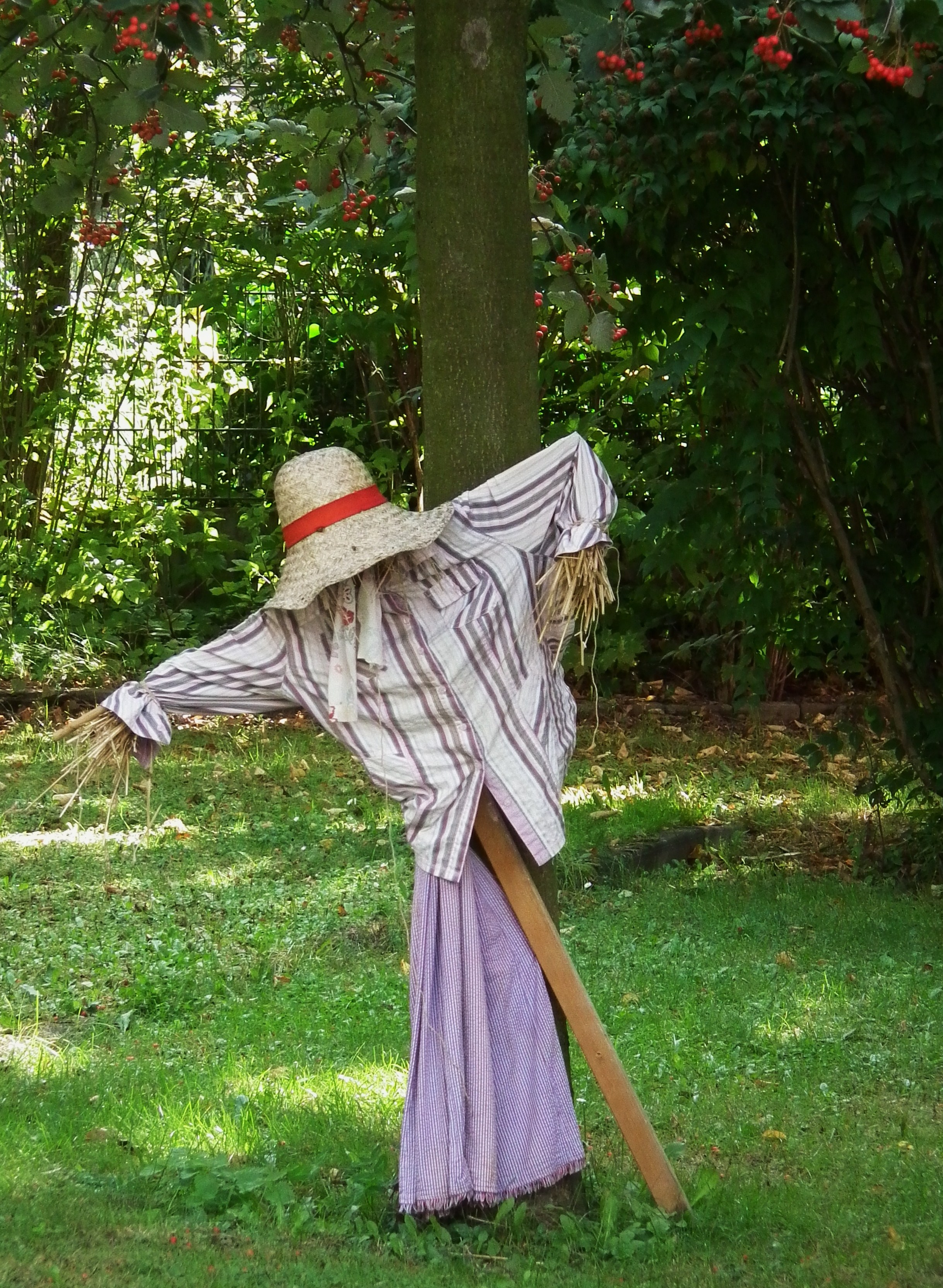 Vogelscheuche, fotografiert in Köln (Nordrhein-Westfalen, Deutschland)